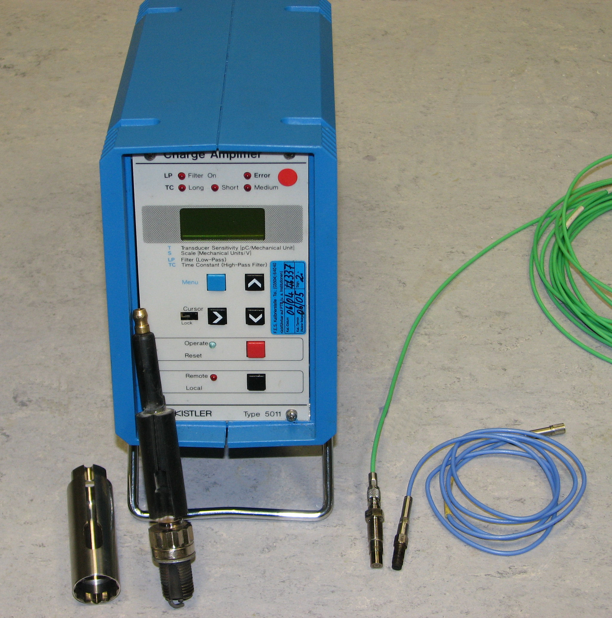 Zuberhör für die Druckindizierung. Messwertverstärker, Zündkerze mit Sensorbohrung, Schulter- und Frontdichtender Hochdrucksensor